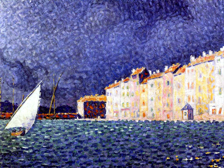 L'orage